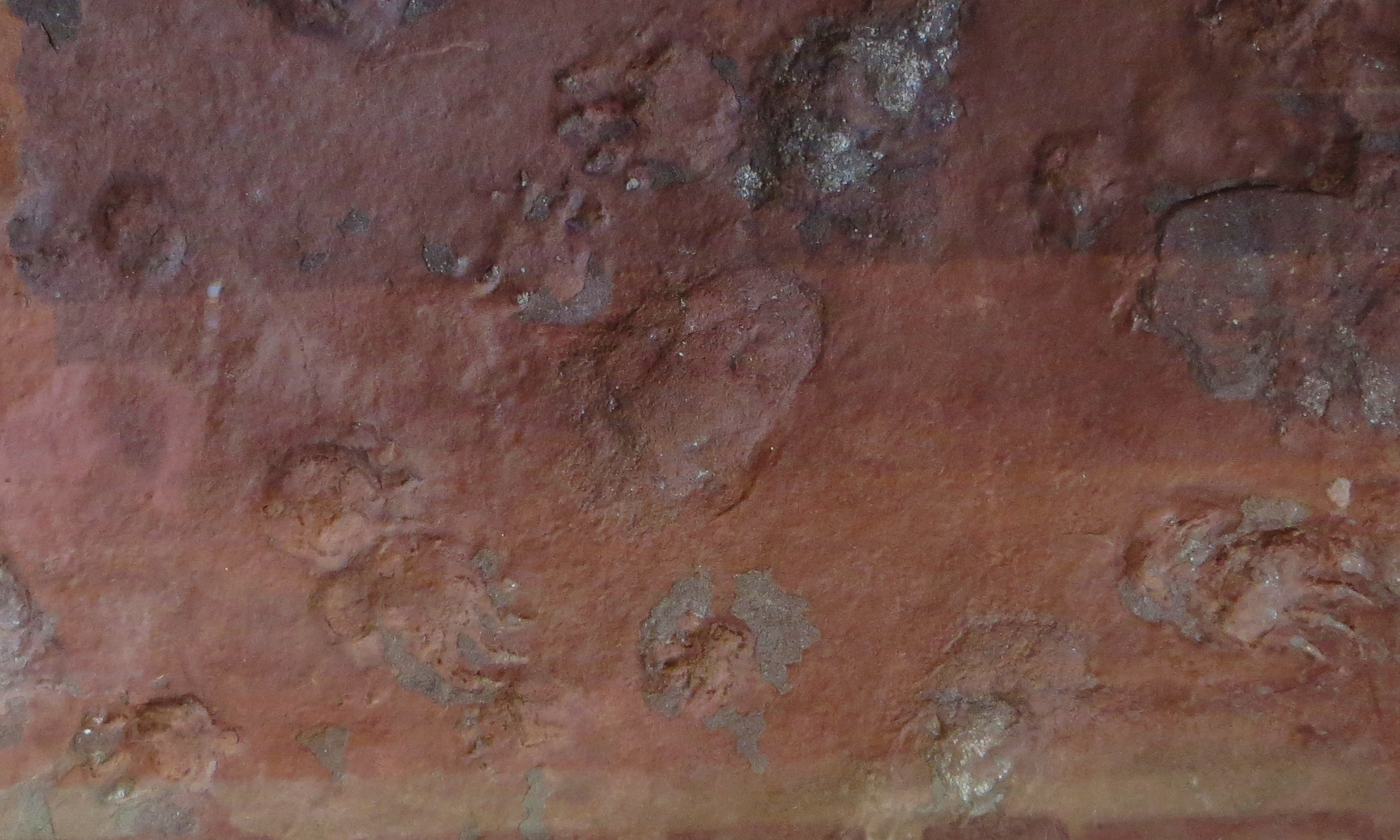 Fossil of Dicynodontipus - Took the picture at Natural History Museum, Bonn University